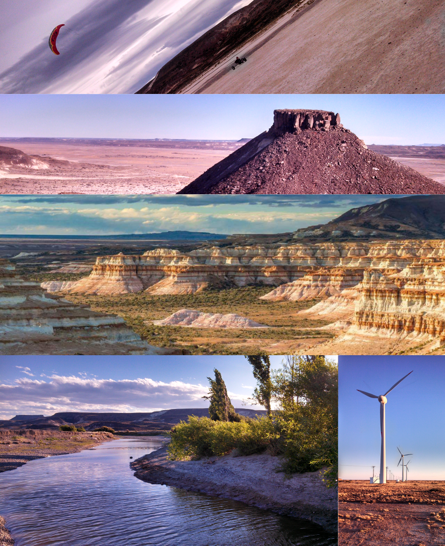 Montaje de fotos sobre Pico Truncado